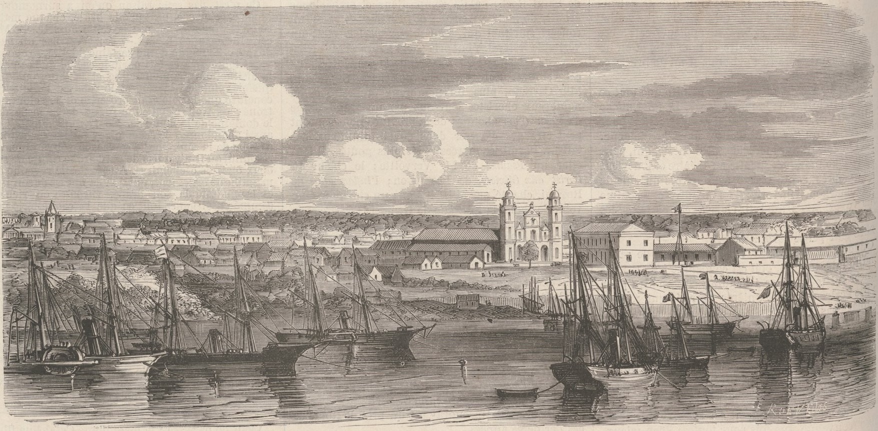 Guerre du Paraguay: La ville de l'Assumption occupée par l'armée alliée.